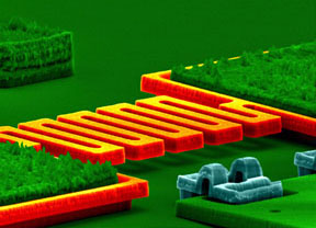 Eingefärbte Elektronenmikroskopaufnahme einer federnd gelagerten Mikroheizung von c.a. 4 µm Breite